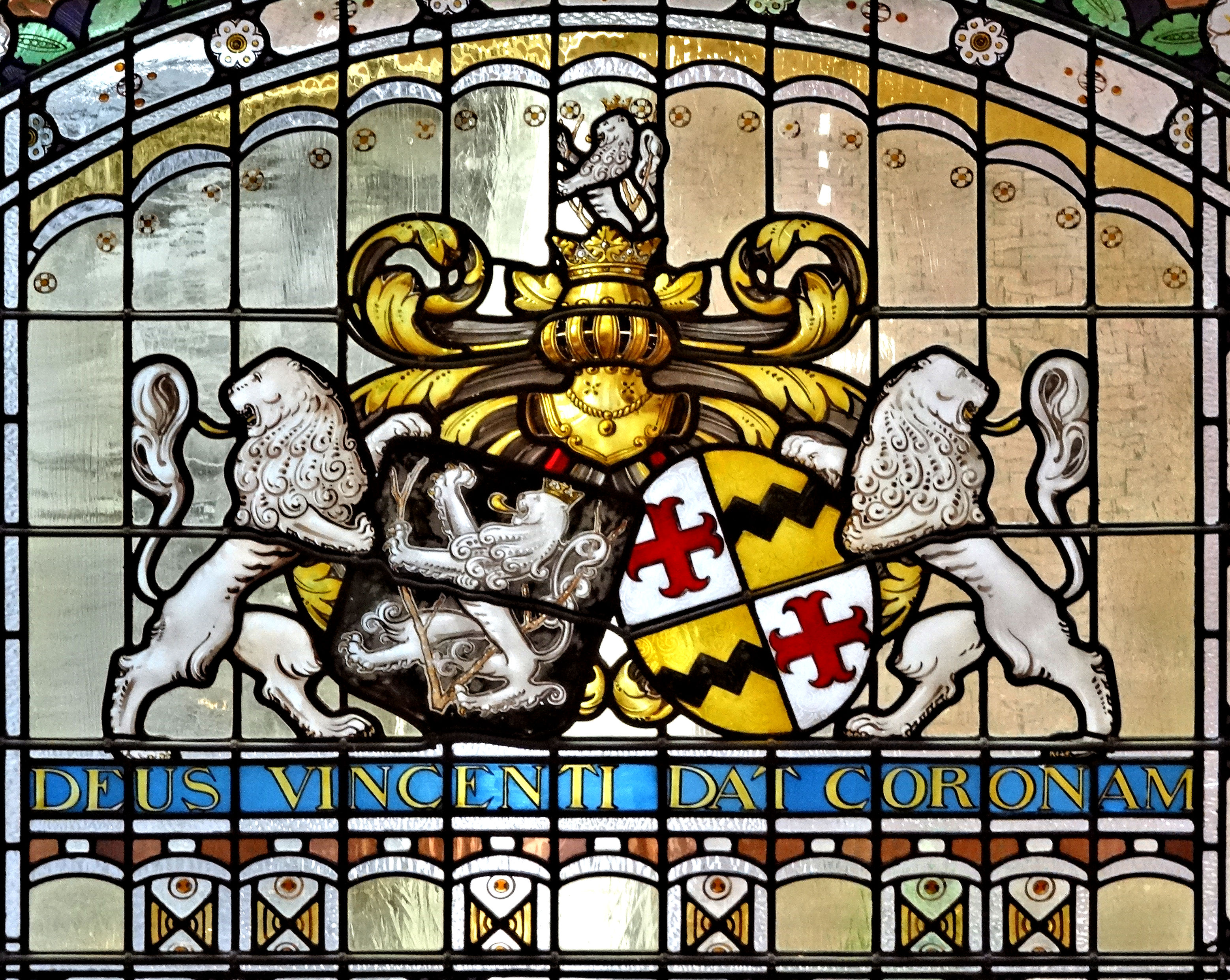 Detail glas-in-loodraam met de wapens van het echtpaar jhr. mr. Hendrik Gerard van Holthe tot Echten (1862-1940) en Constantia Johanna Anna Christina barones van der Feltz (1870-1953). Het raam werd 1906-1907 geplaatst in Huize Ebbenerve in Assen en was gemaakt in het atelier van J.W. Gips.